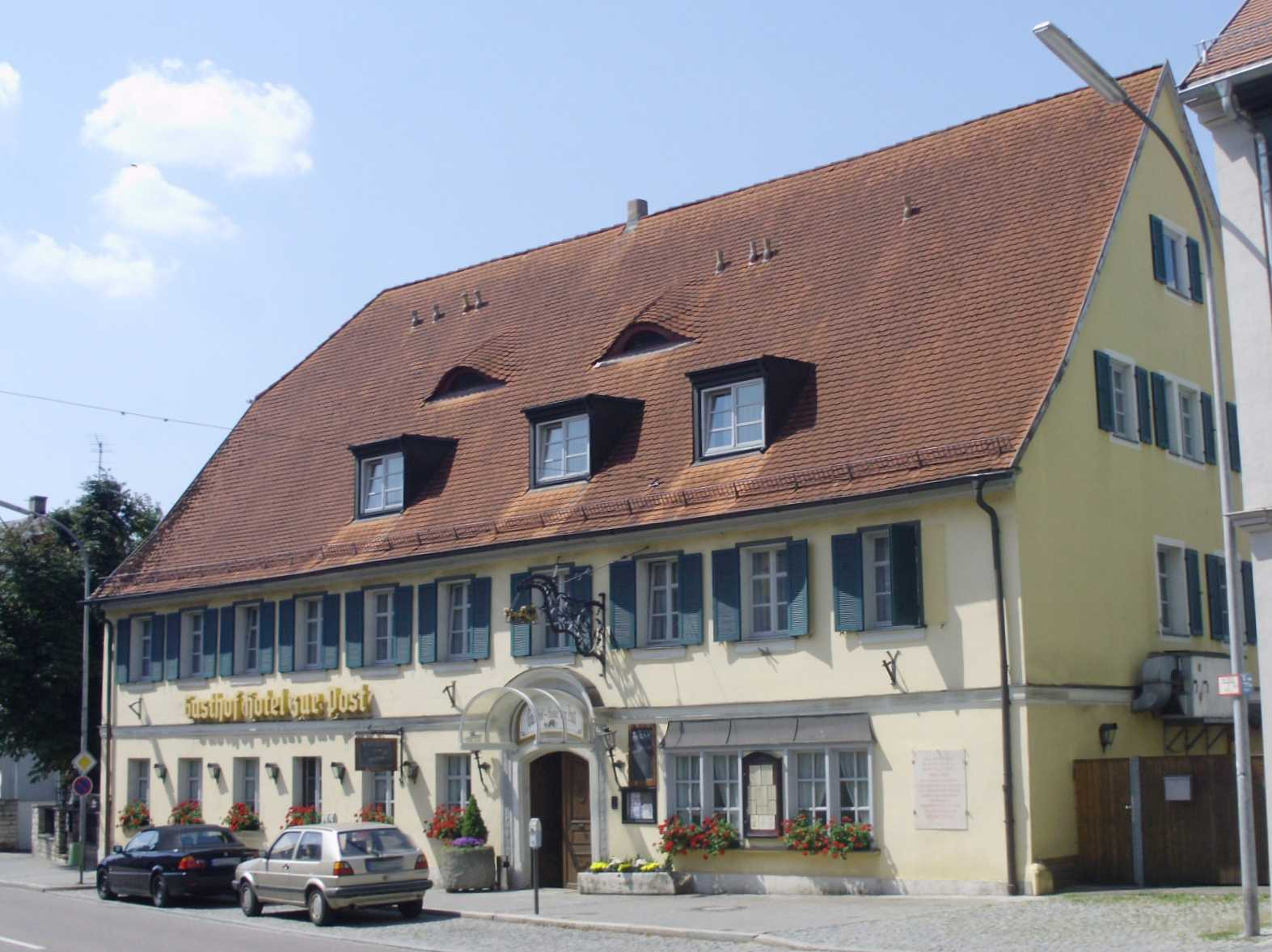 Gunzenhausen im mittelfränkischen Landkreis Weißenburg-Gunzenhausen, Bahnhofstr. 7